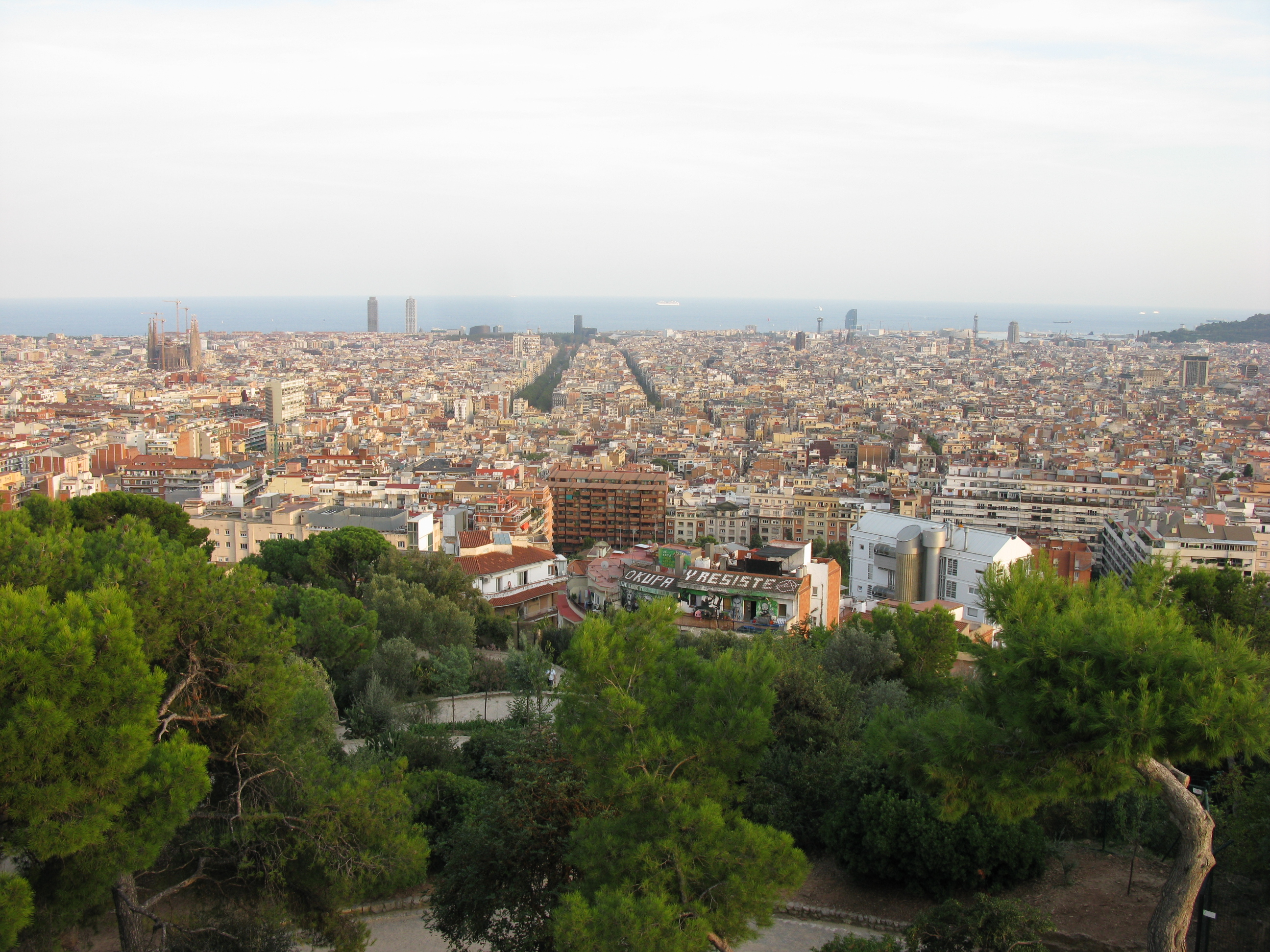 Барселона